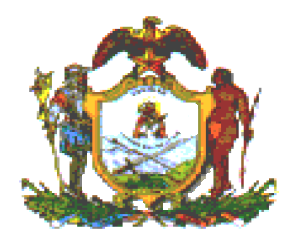 Escudo del municipio Trujillo, estado Trujillo, Venezuela